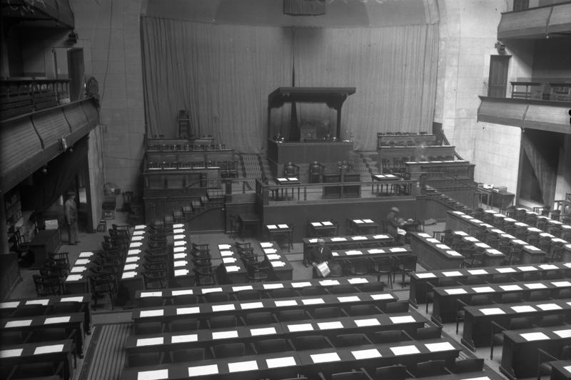 Der Völkerbund-Sitzungssaal, der Reformationssaal in Genf